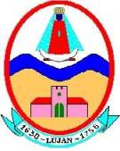 escudo aprobado por el concejo deliberante en 1939